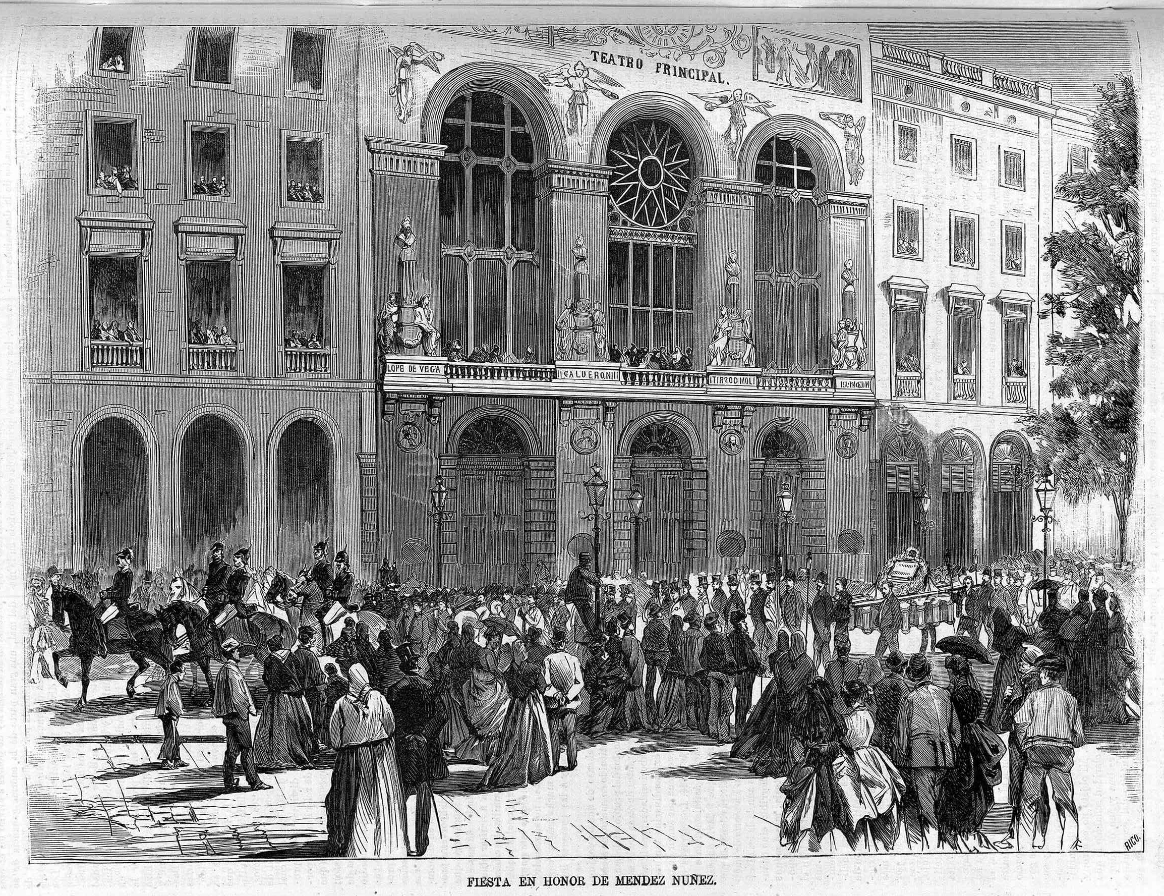 Fiesta en honor de Méndez Núñez.